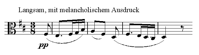 Les premières mesures de la partie d'alto de la quatrième pièce des Märchenbilder pour alto & piano de Robert Schumann